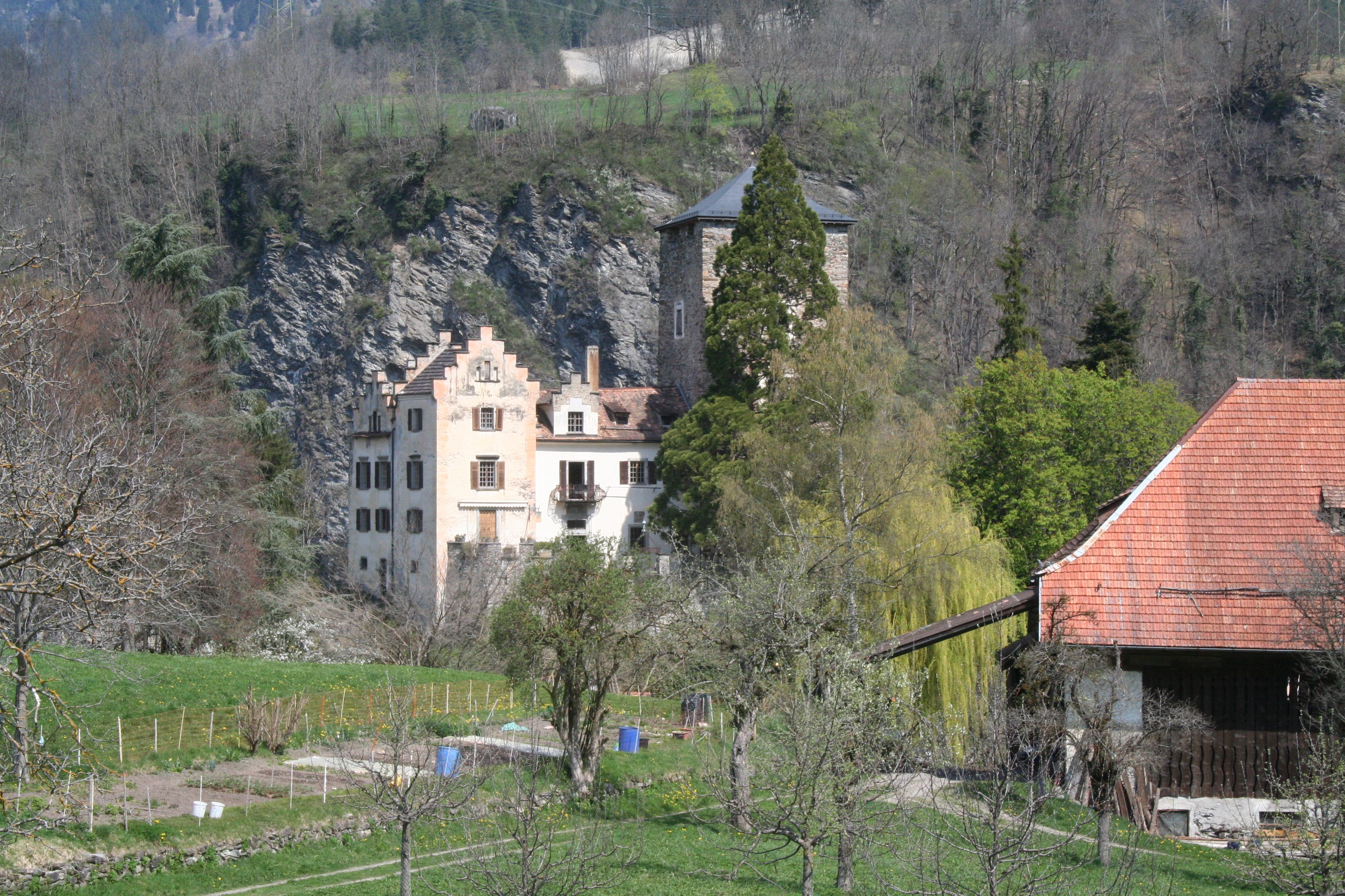 Schloss Baldenstein, Ansicht von Süden